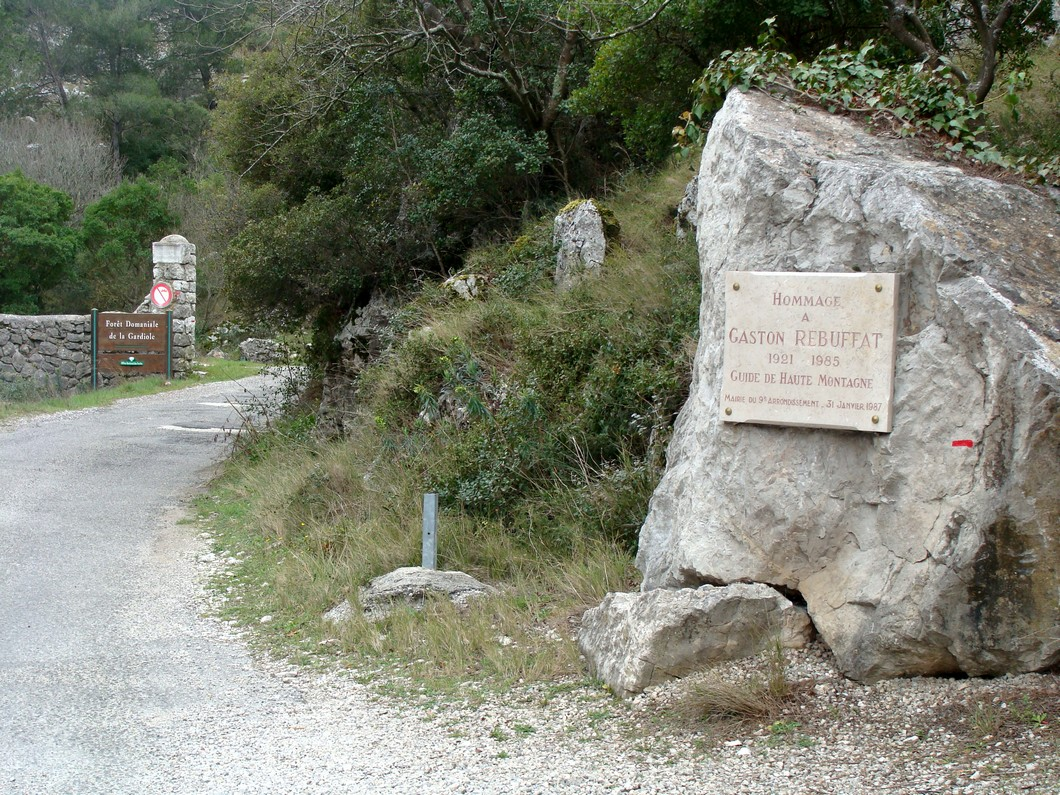 Plaque à la mémoire de Gaston Rébuffat sur la route d'accès à la maison forestière de la Gardiole, à l'est du massif de Puget (Marseille, Bouches-du-Rhône)